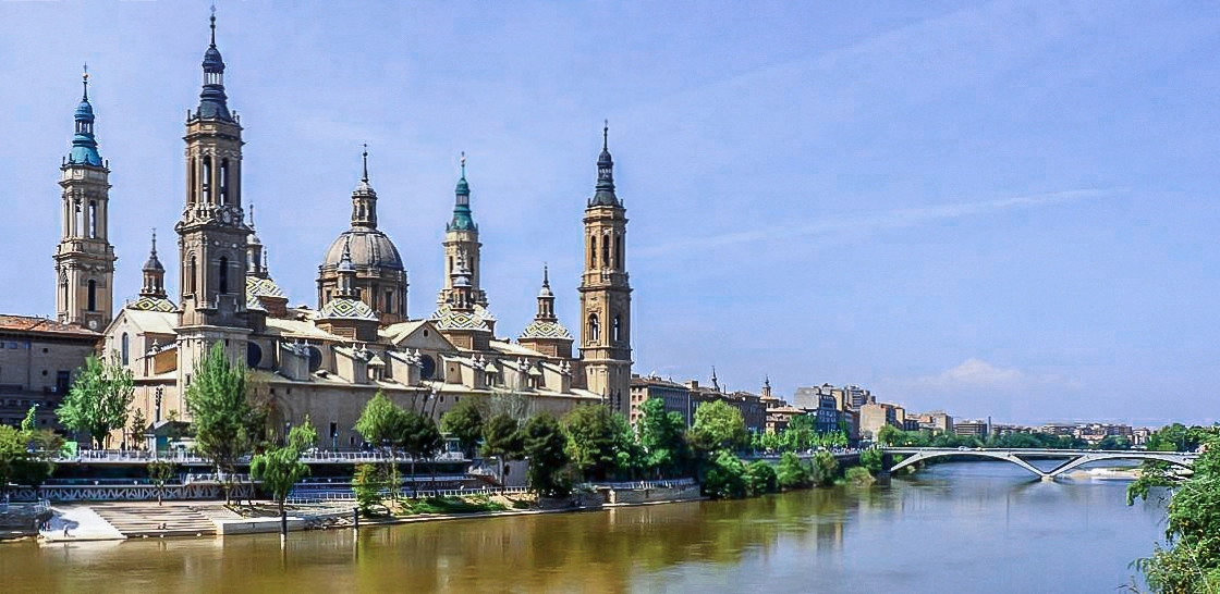 Basílica del Pilar y río Ebro (Zaragoza)